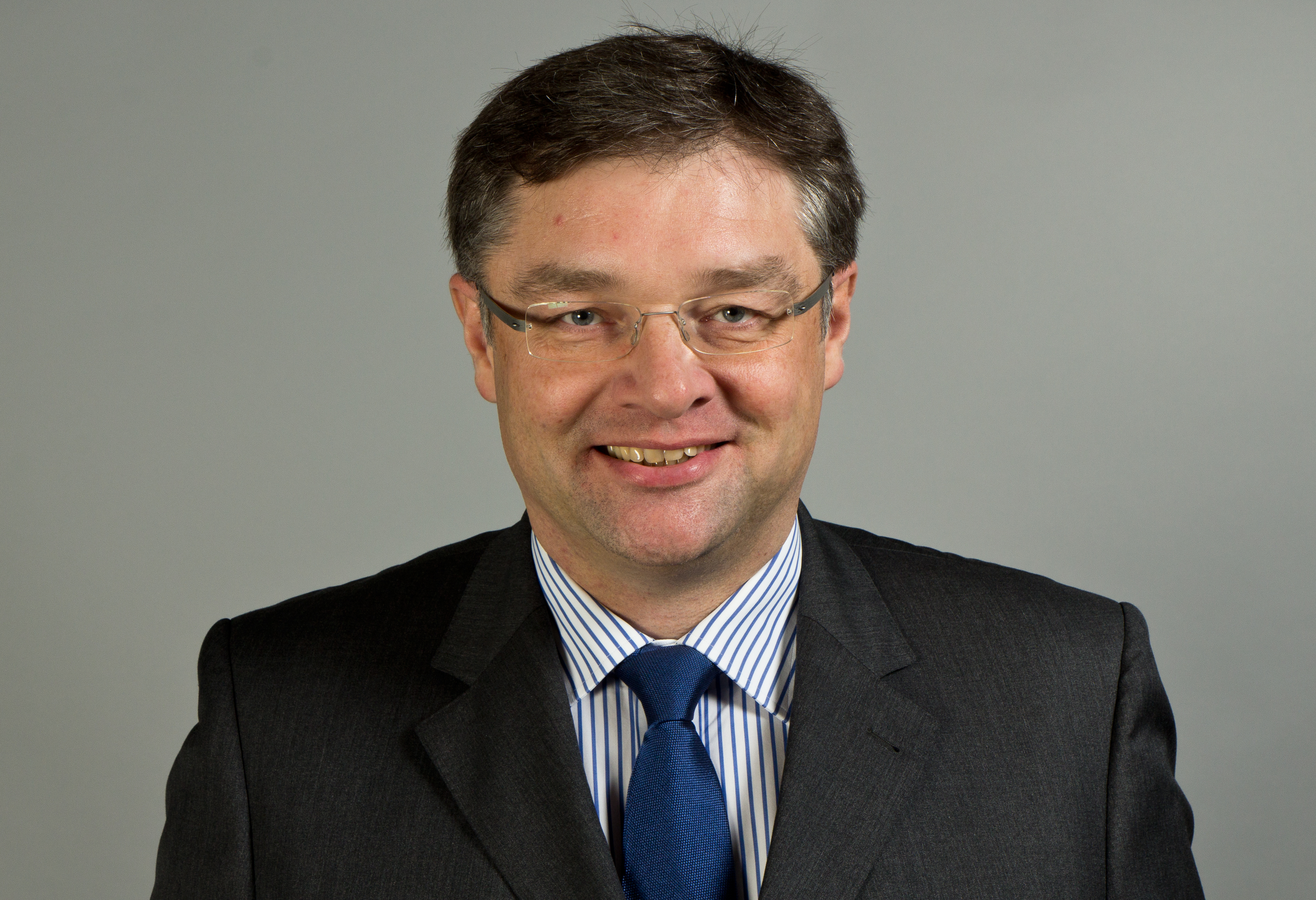 Holger Zastrow (* 12. Januar 1969 in Dresden) ist ein deutscher Politiker (FDP). Er ist Landesvorsitzender der FDP Sachsen sowie Vorsitzender der FDP-Fraktion im Sächsischen Landtag. Von Mai 2011 bis Dezember 2013 war er zudem stellvertretender Bundesvorsitzender seiner Partei. Wikipedia im Landtag – Sachsen 17. bis 18. Dezember 2013 in DresdenDieses Foto wurde im Rahmen des Projektes „Wikipedia im Landtag“ erstellt. Fragen zur Nachnutzung Wenn Sie Fragen zur Nachnutzung dieses Bildes haben, können Sie sich jederzeit gern an wenden